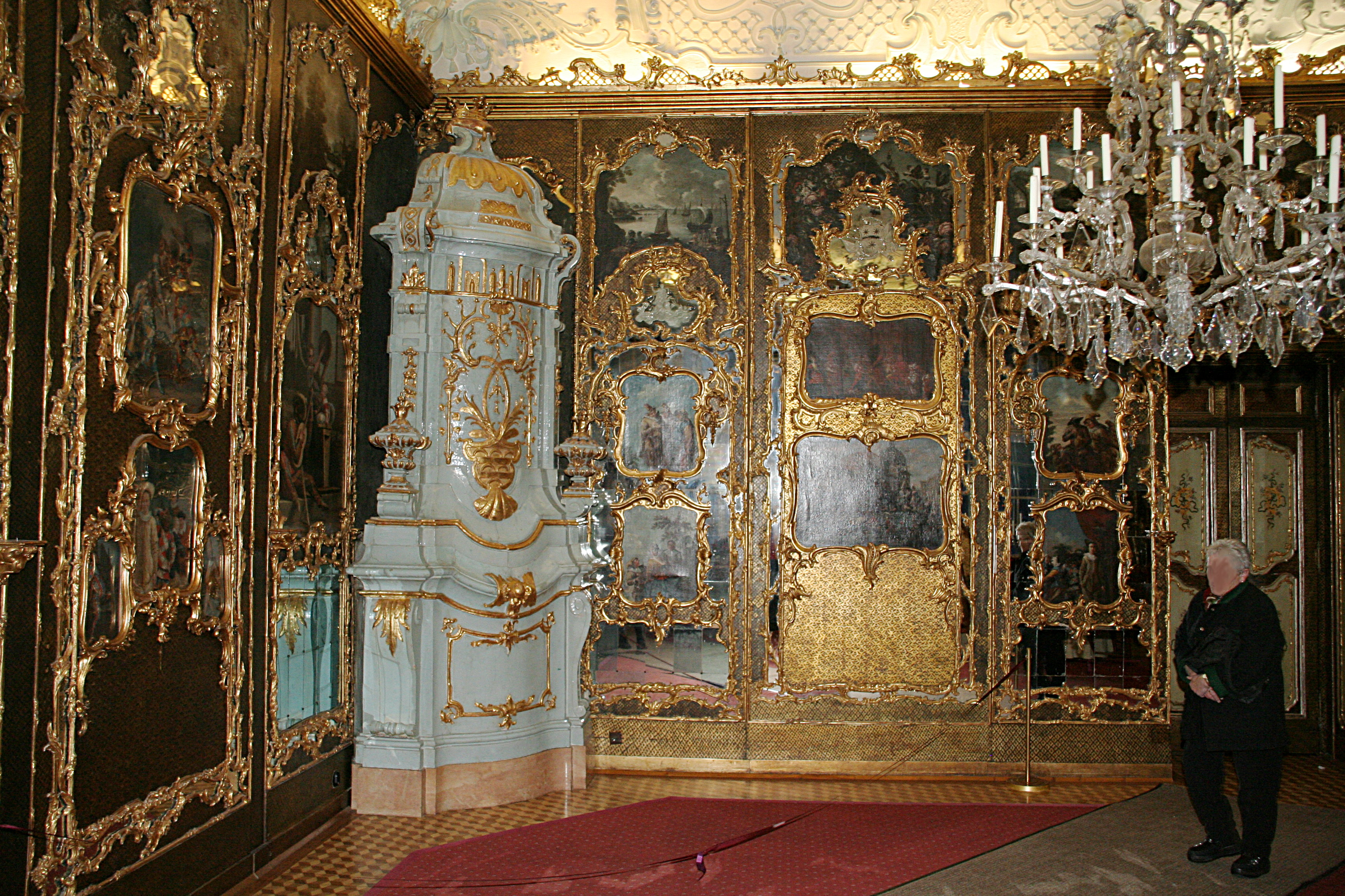 Schloß Leopoldskron Spiegelsaal